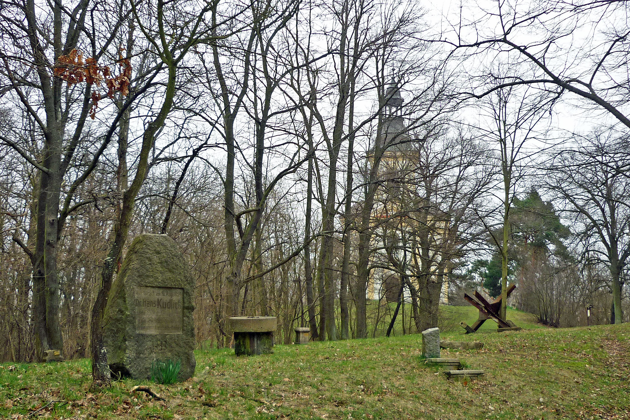 Widmungsstein für Hans Kudlich aus dem Jahr 1933, seit 2003 auf dem Winteritzer Kapellenberg, urspr. auf dem Legerberg im Duppauer Gebirge: „Hier sprach am 19. Aug. 1888 Dr. Hans Kudlich In dankbarer Erinnerung die deutschen Bauern des Saazer und Karlsbader Kreises.“